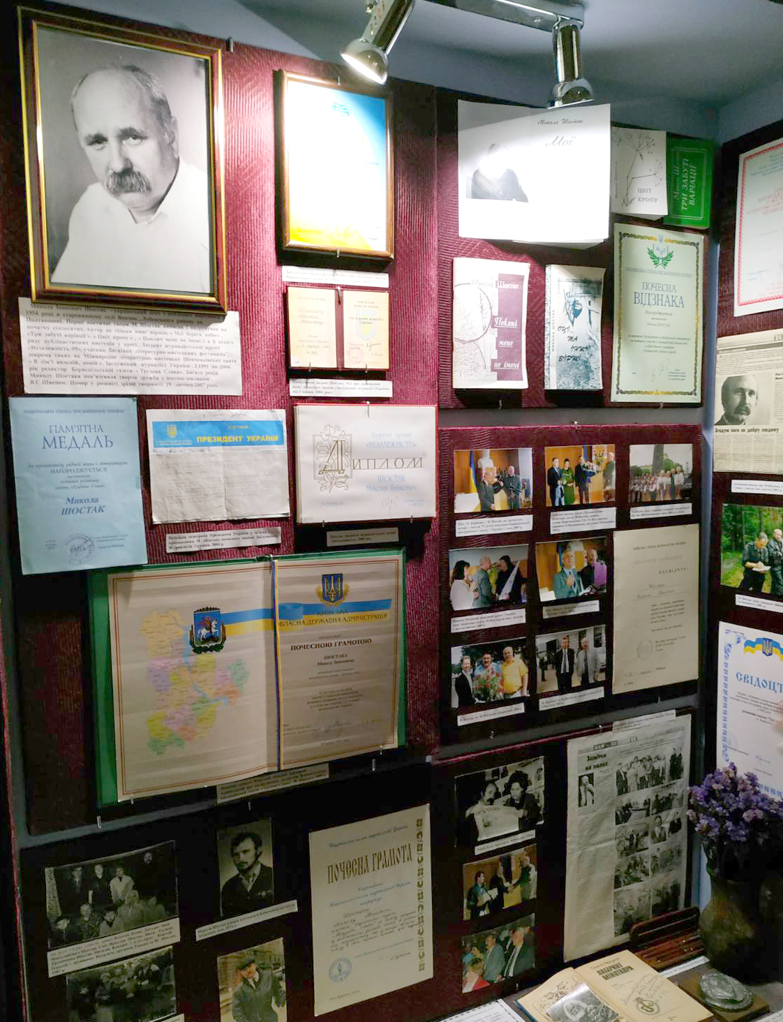 Експозиція в Іванківському народному краєзнавчому музеї, присвячена пам’яті Заслуженого журналіста України Миколи Івановича Шостака